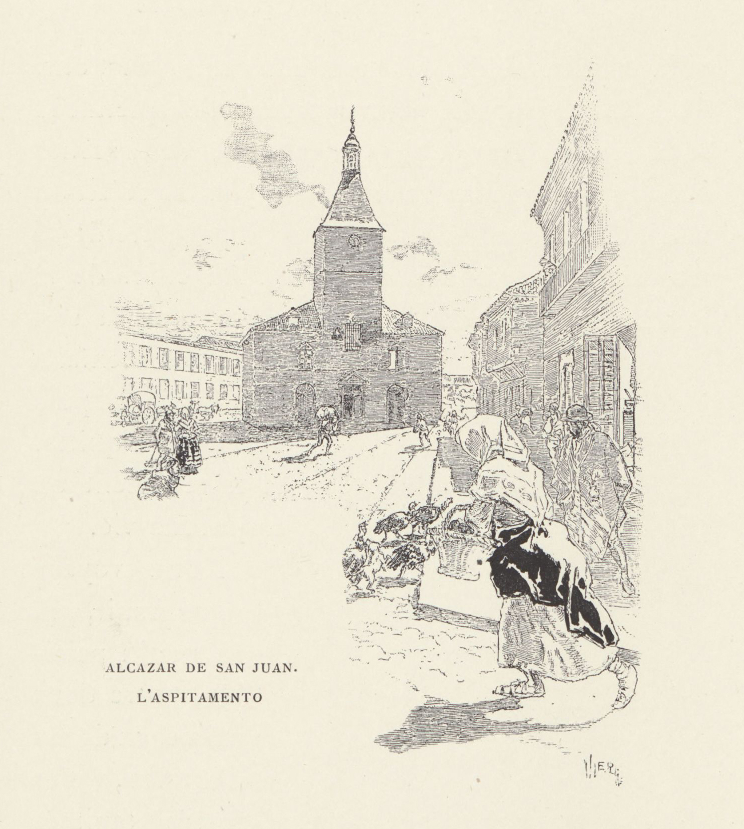 Alcazar de San Juan. L'aspitamento.